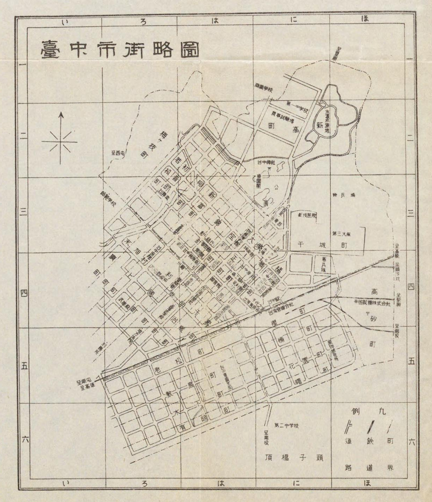 圖上可見台中市町名和主要設施